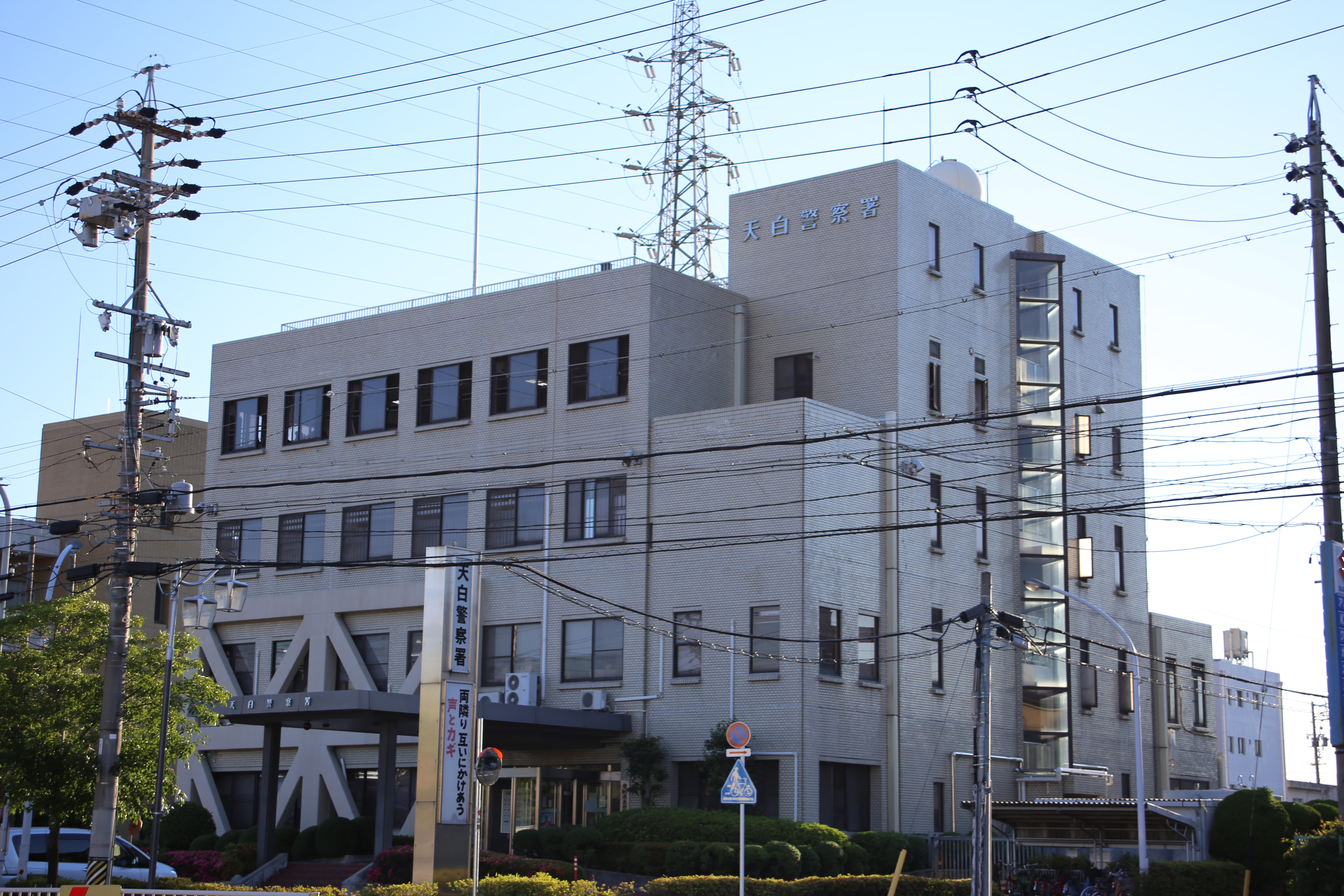 名古屋市天白区植田南の愛知県警察天白警察署を東側公道北側より撮影